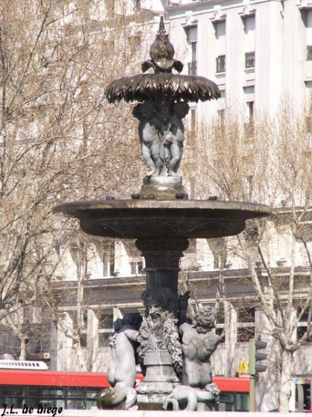 Copia de la Fuente de la Alcachofa, instalada en la Plaza del Emperador Carlos V, en Madrid España